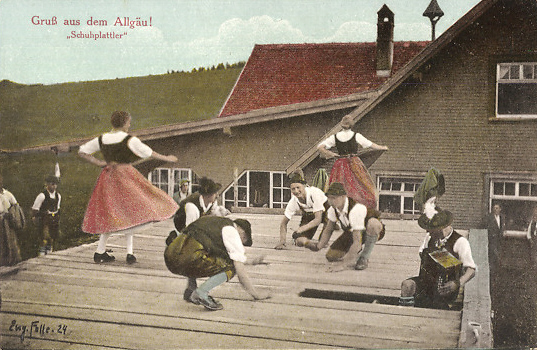 Ansichtskarte von Eugen Felle Motiv: Gruß aus dem Allgäu, Schuhplattler